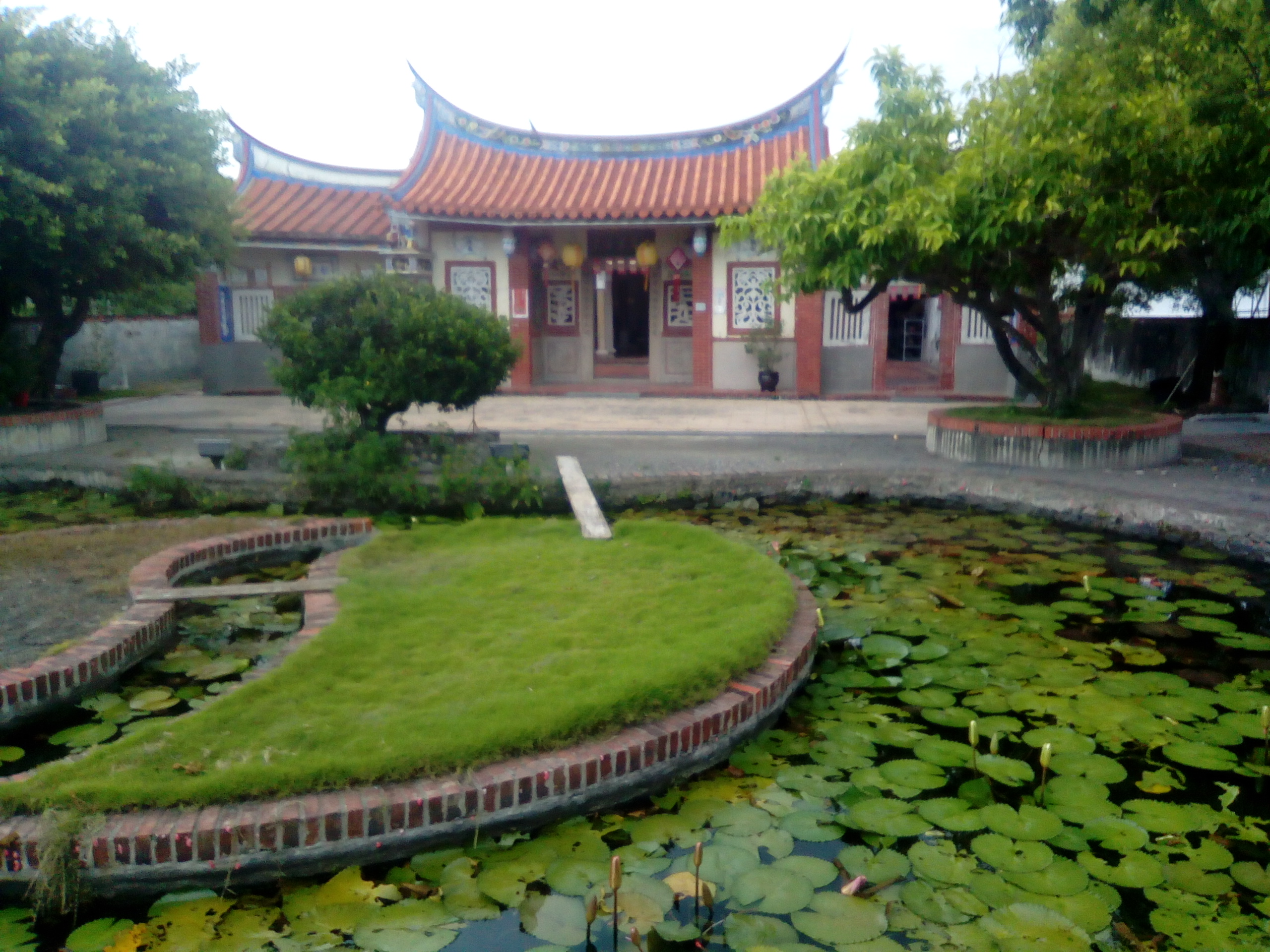 鄉內三級古蹟之一